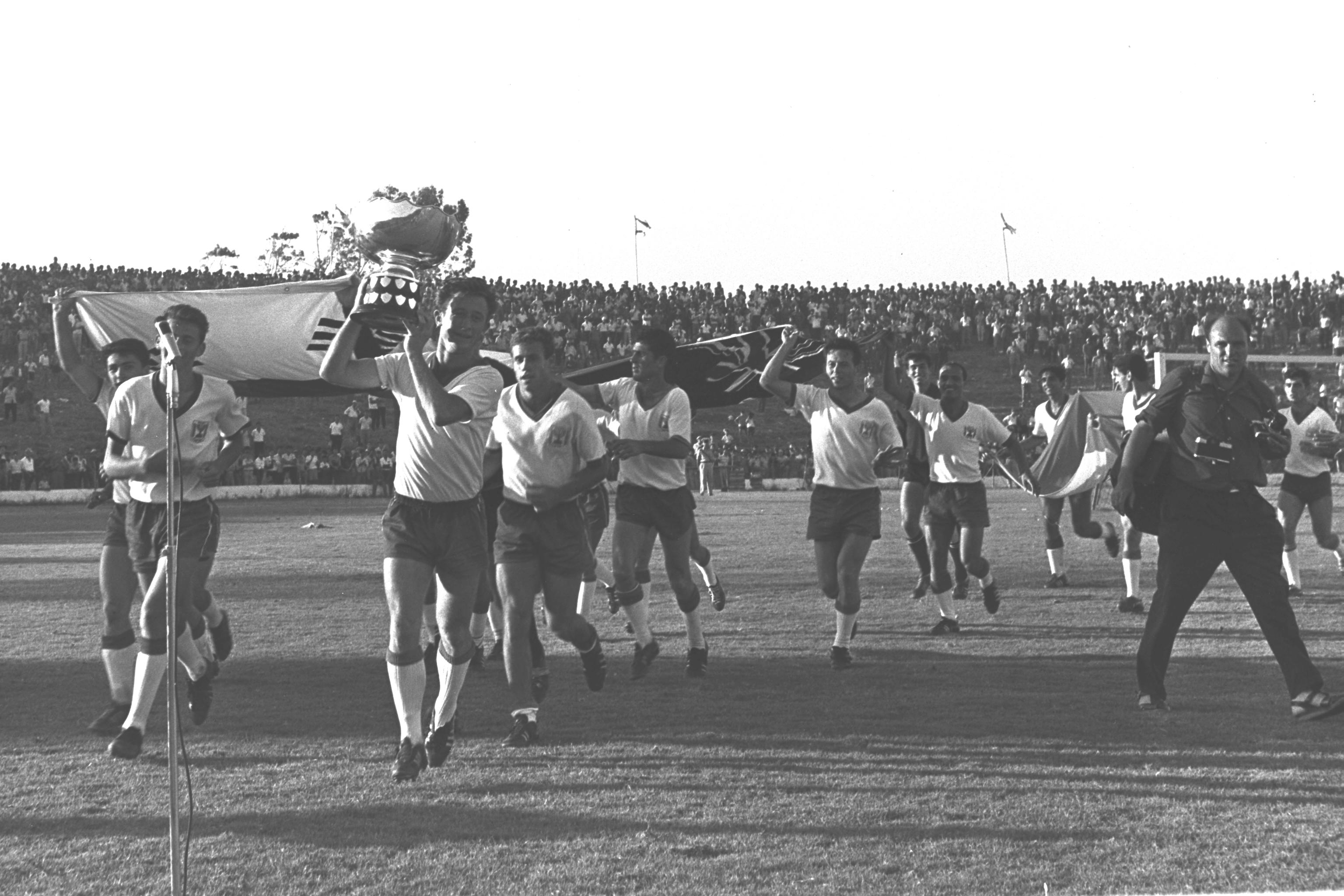 The Israeli soccer team holds the Asian Cup after its victory over South Korea at Ramat Gan stadium. נבחרת ישראל בכדורגל מחזיקה בגביע אסיה לאחר ניצחונם את דרום קוריאה באיצטדיון רמת גן